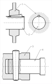 Połączenie klinowe - schemat